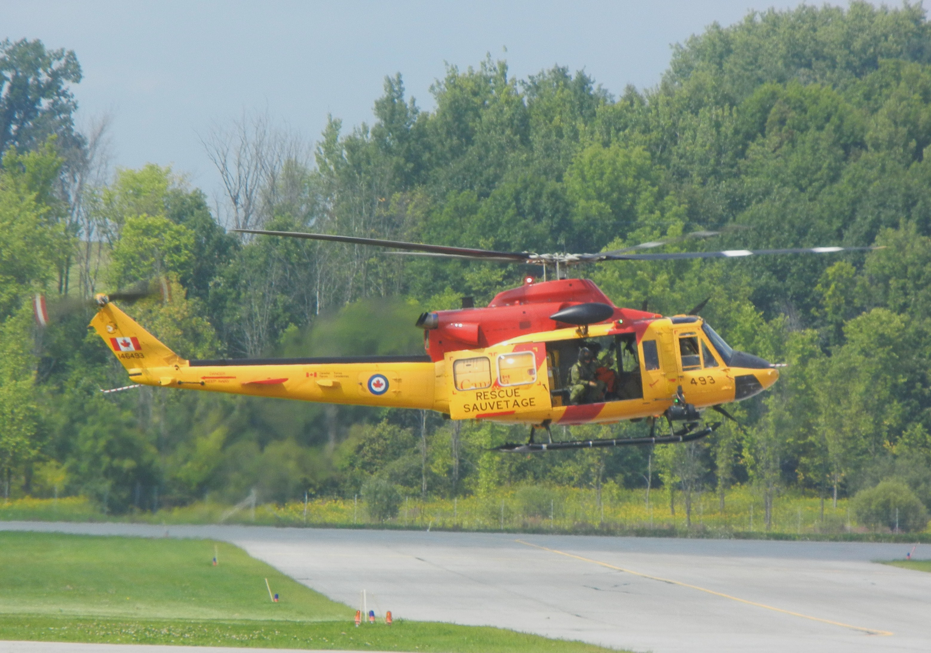 griffon CH-146 au départ de Gatineau YND